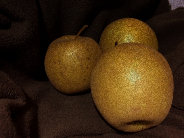 Poma carabruta